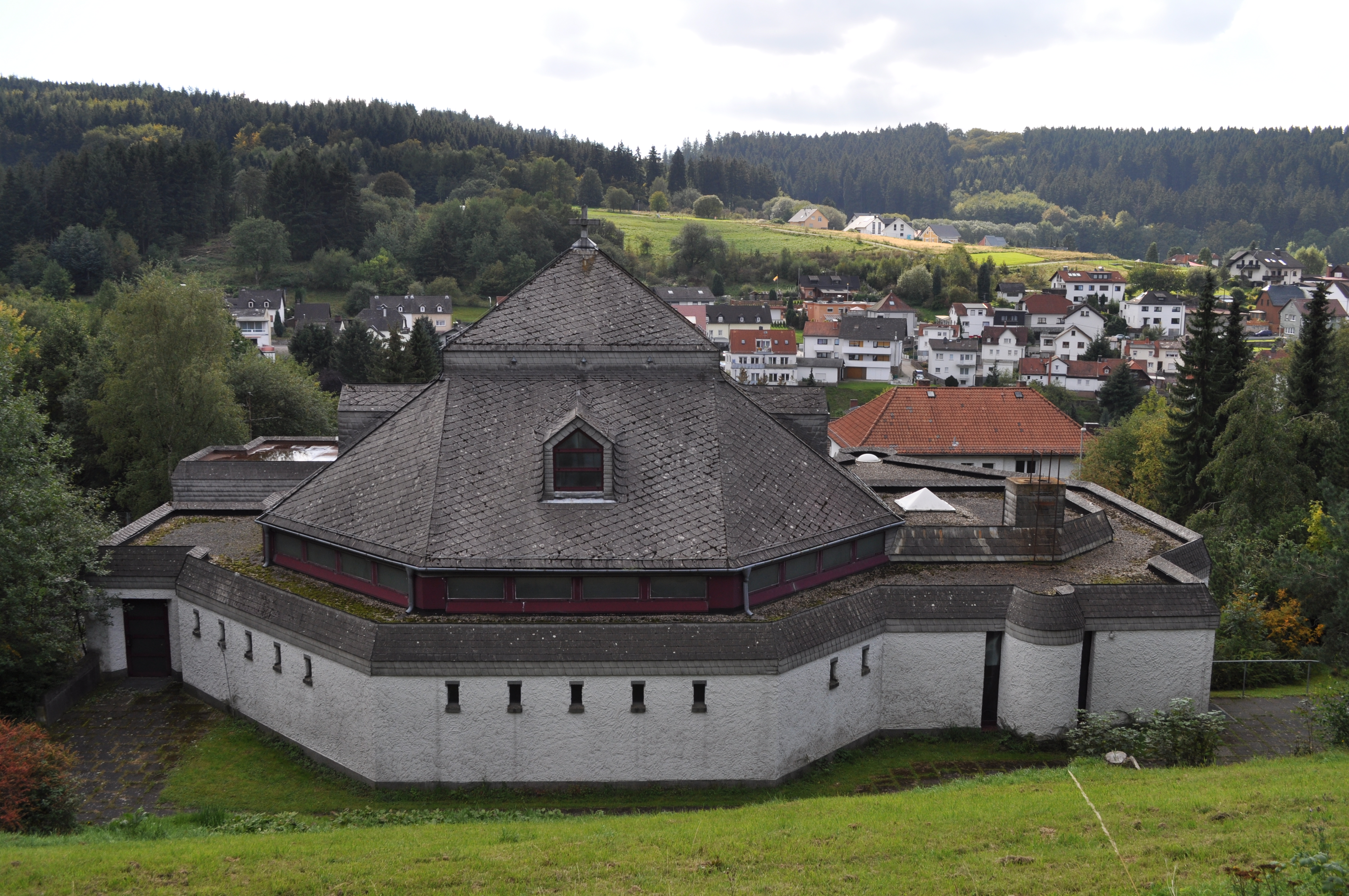 (neue) katholische Kirche in Niederreifenberg